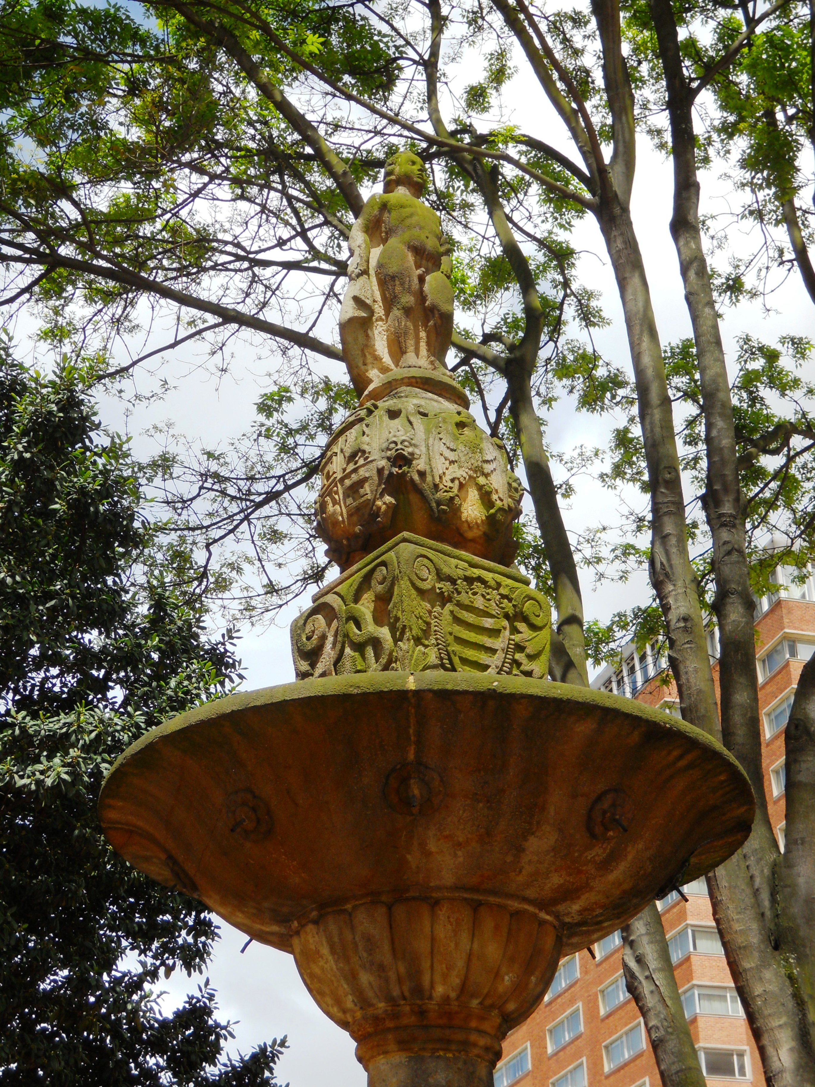 Réplica del Mono de la Pila en el sector de San Diego. Bogotá.